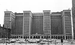 ehem. Hauptquartier General Motors in Detroit